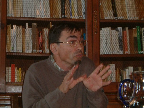 Serge Martin